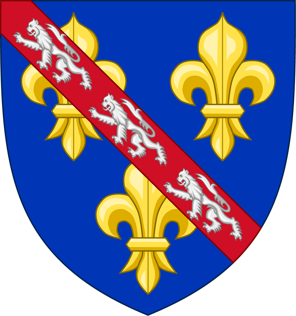 Armes des Bourbon-Vendôme